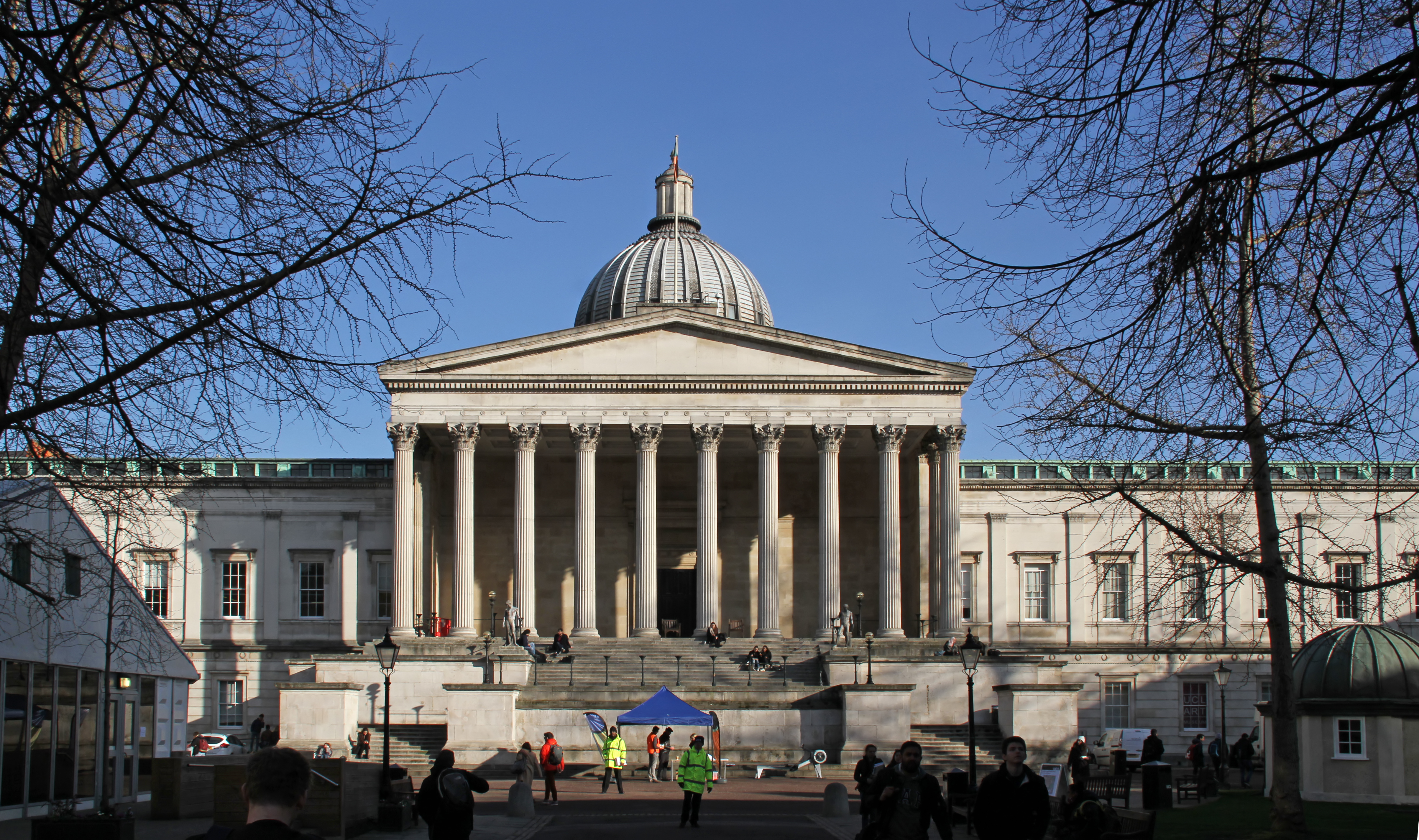 UCL 2 Wilkins building